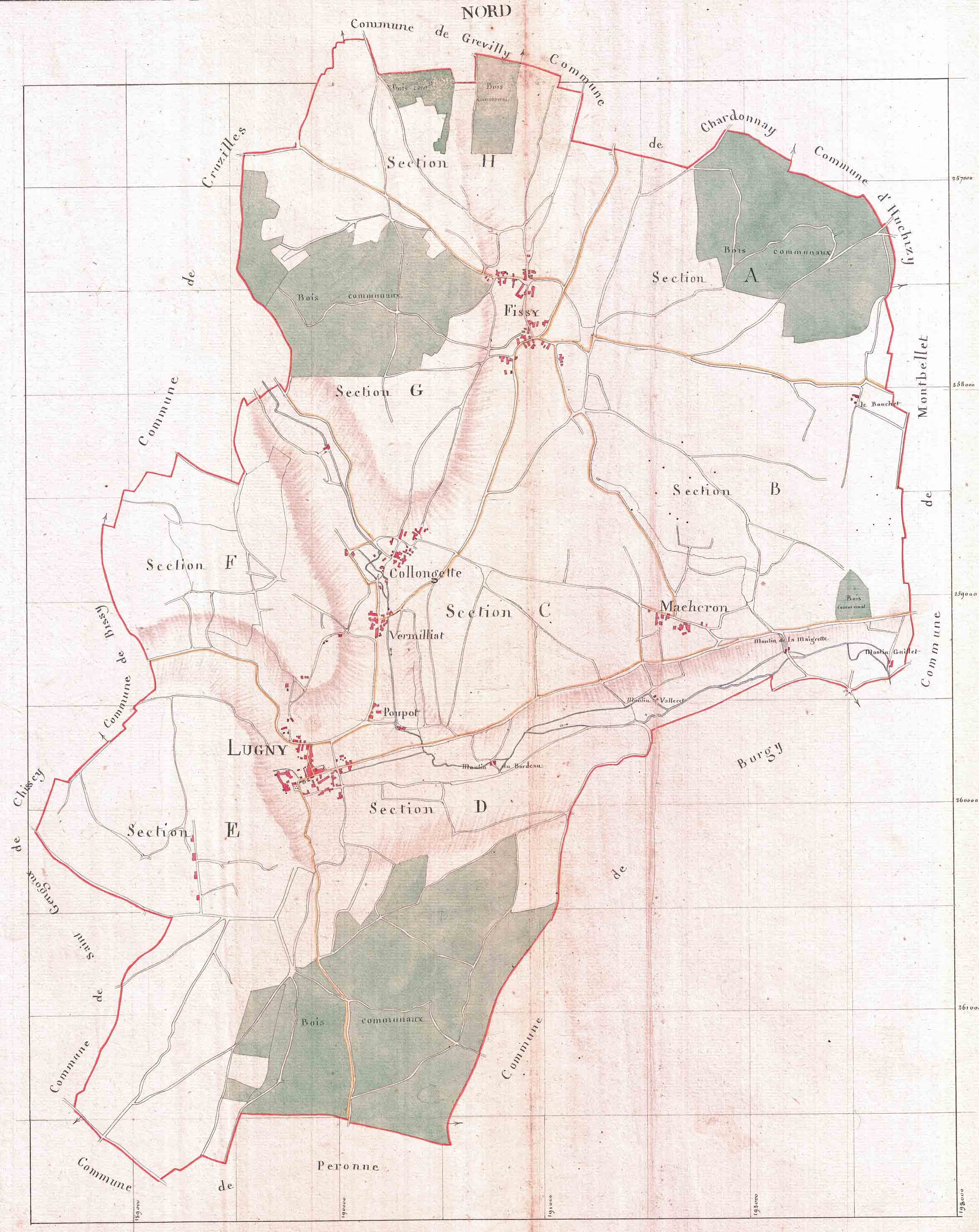 Le plan d'assemblage du cadastre Napoléon de la commune de Lugny (Saône-et-Loire), dressé en 1809